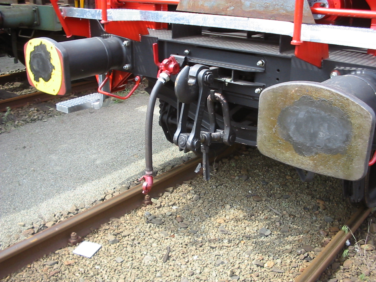 Schroefkoppeling (los)